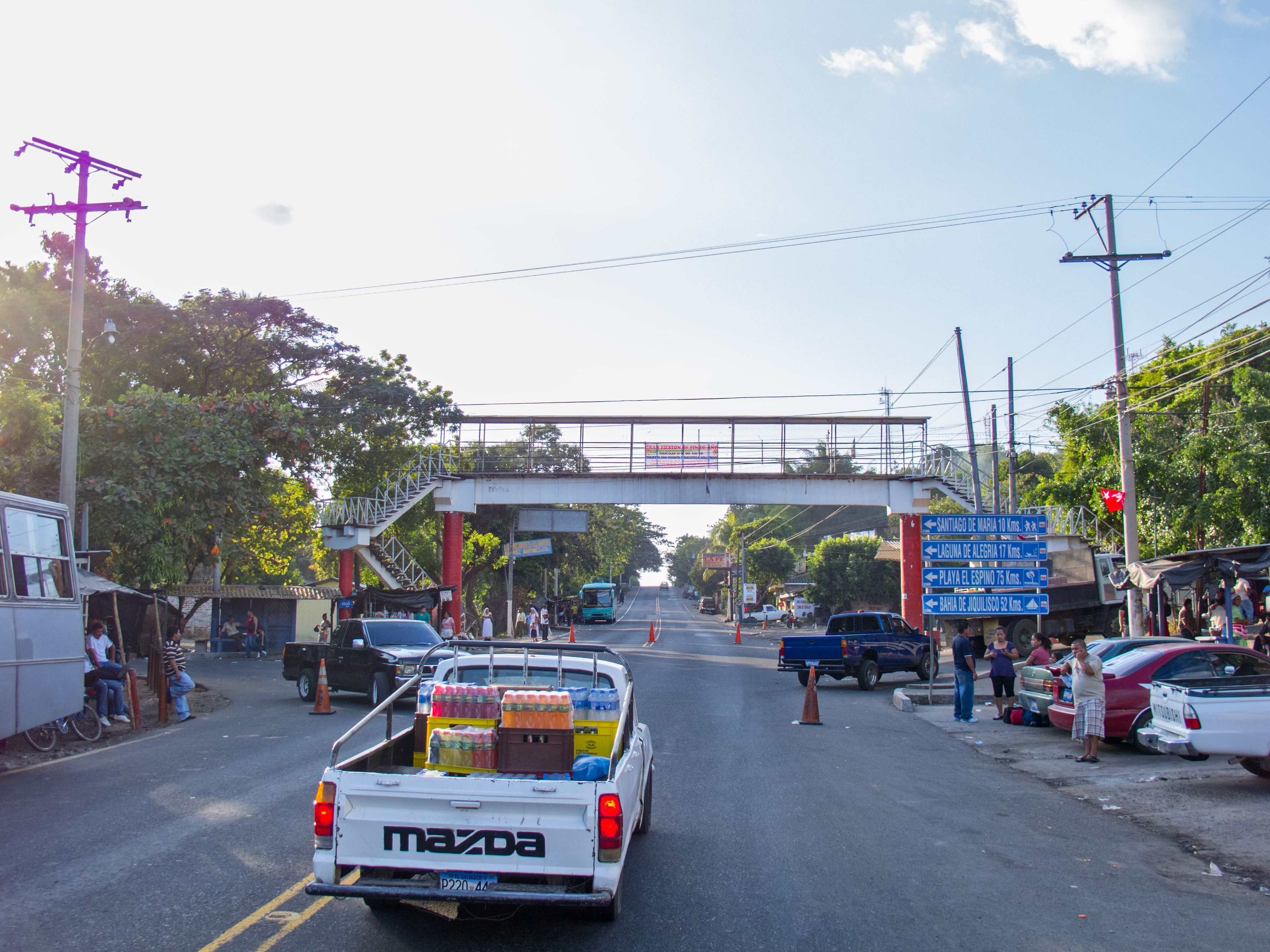 El Triunfo, Dpto. de Usulután, El Salvador. Es la carretera Panamericana